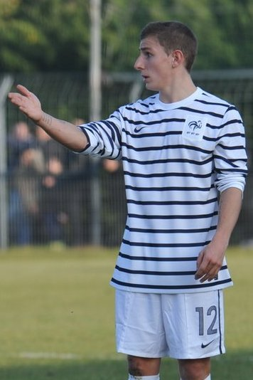 Lucas DIGNE sous les couleurs de l'équipe de France U19